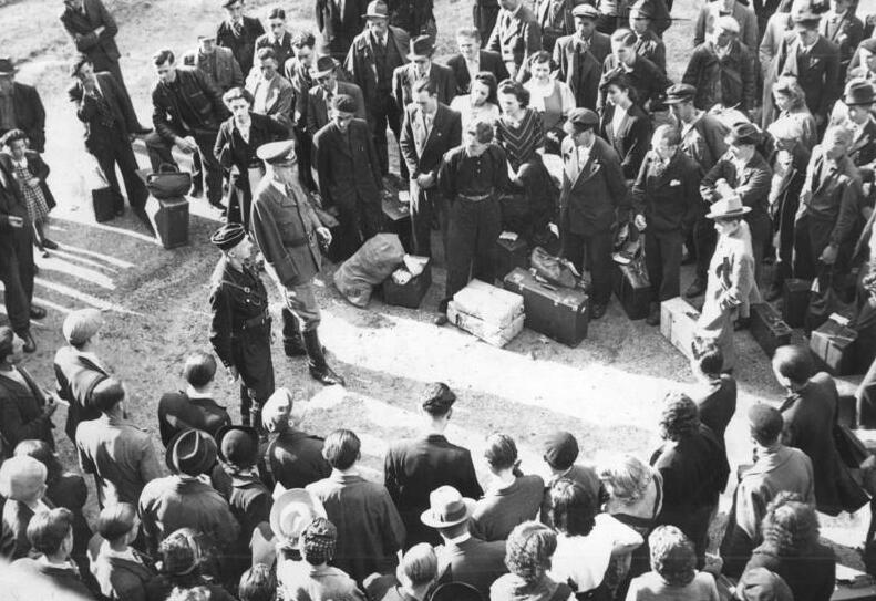 Paris, Anwerbung französischer Arbeiter ADN-Zentralbild-Archiv II. Weltkrieg 1939-45 Im von den deutschen Faschisten besetzten Frankreich im Juli 1942. In Paris werden Frauen und Männer zur Rüstungsarbeit in Deutschland verpflichtet. [Fulgur] 4290-42 [Offiziere vor Menschenmenge]